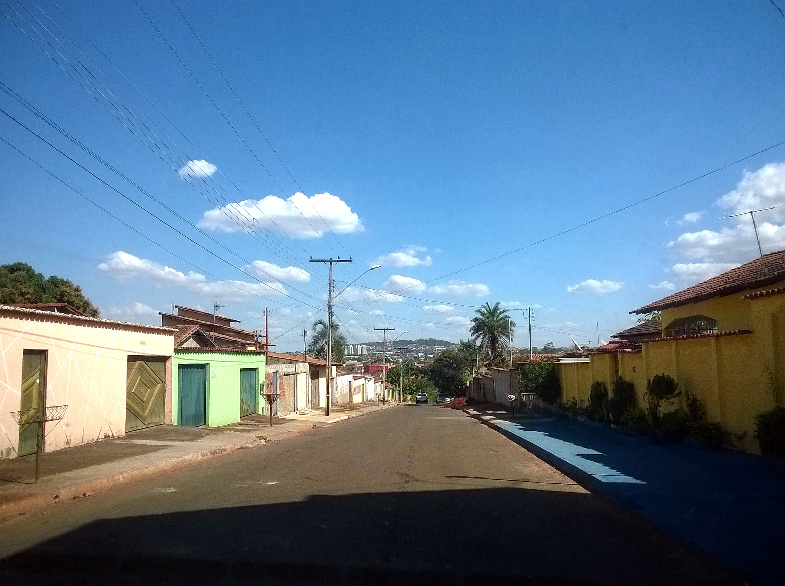 Rua RM-5, no bairro Residencial Maringá, em Goiânia. Foto tirada em 21 de julho de 2015